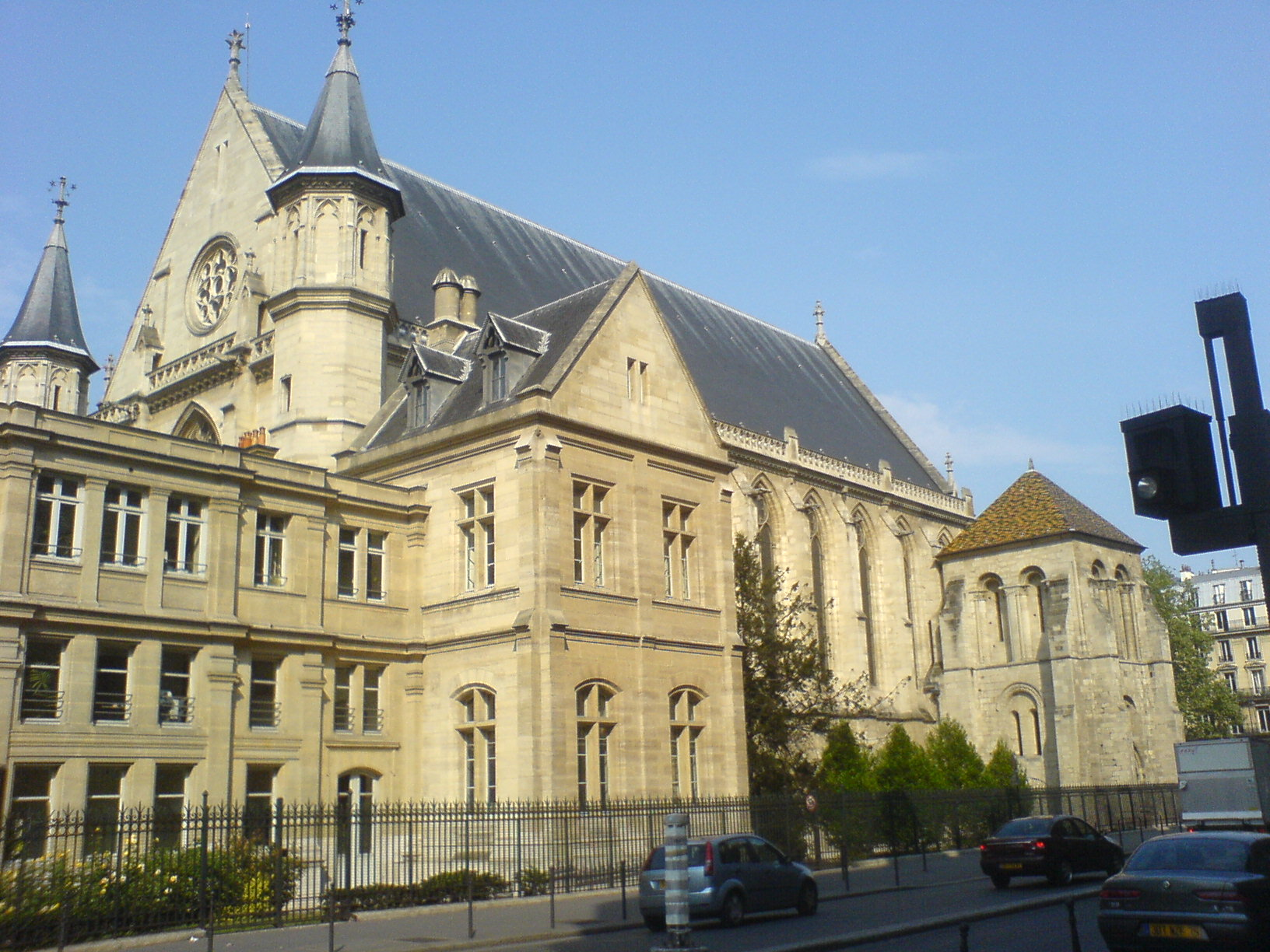 Musée du Conservatoire national des Arts et Métiers